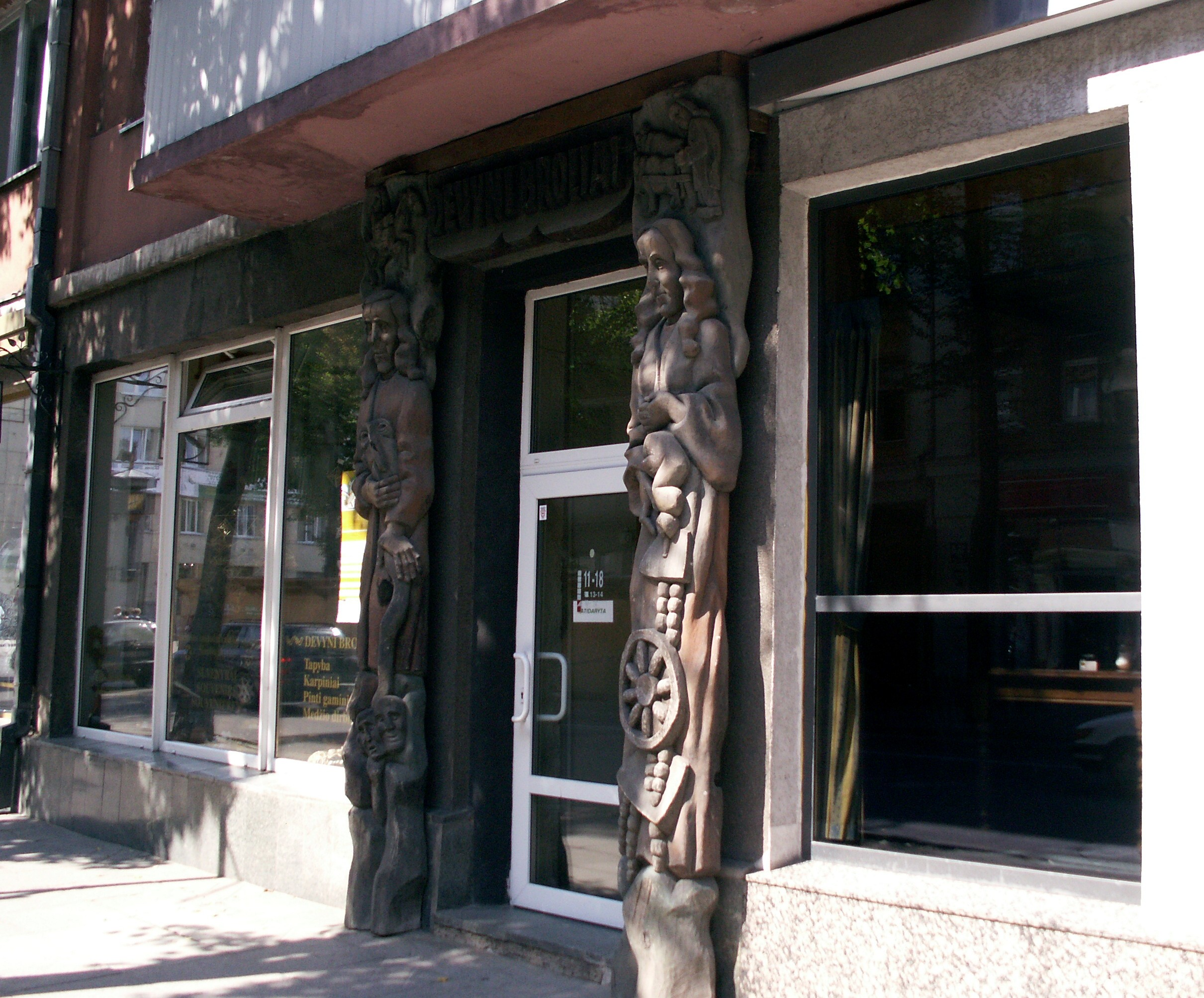 Parduotuvės „Du broliai“ portalas, Šiauliai, skulptorius Vitalijus Lukošaitis